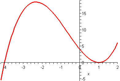 zelf, Maple 9.5